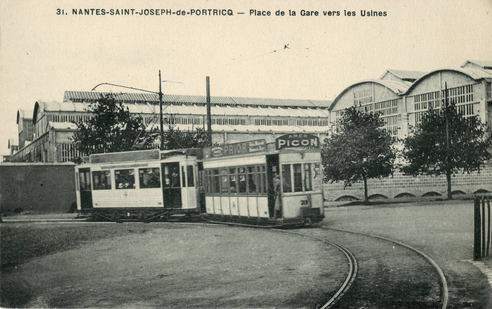 Carte postale ancienne éditée par F. Chapeau à Nantes n°31: NANTES-SAINT-JOSEPH-DE-PORTRICQ - Place de la Gare vers les Usines